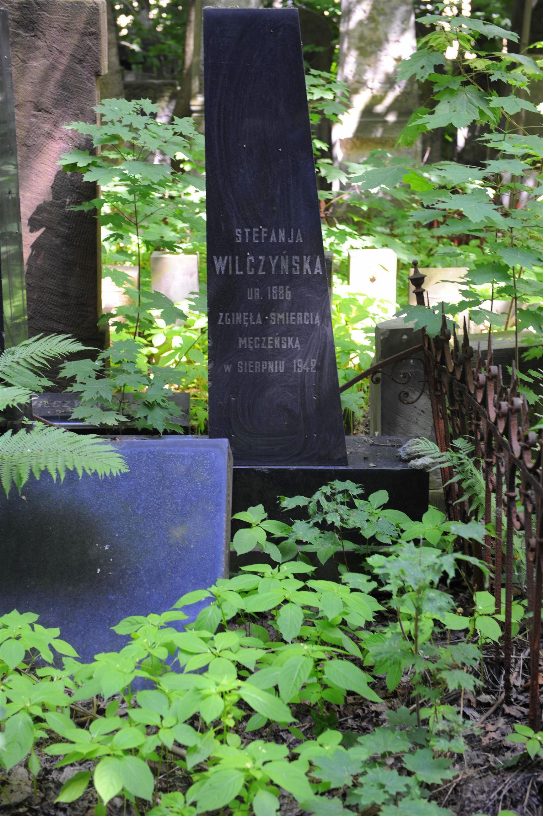 Symboliczny grób Stefanii Wilczyńskiej na Cmentarzu Żydowskim w Warszawie